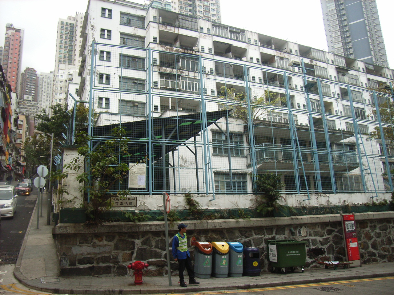 {荷李活}-道警察宿舍是zh:香港一處前已婚高級zh:警察zh:宿舍，位於zh:香港島上環的-{荷李活道}-，正門在其東面的zh:鴨巴甸街35號。 By SHOLYWOD